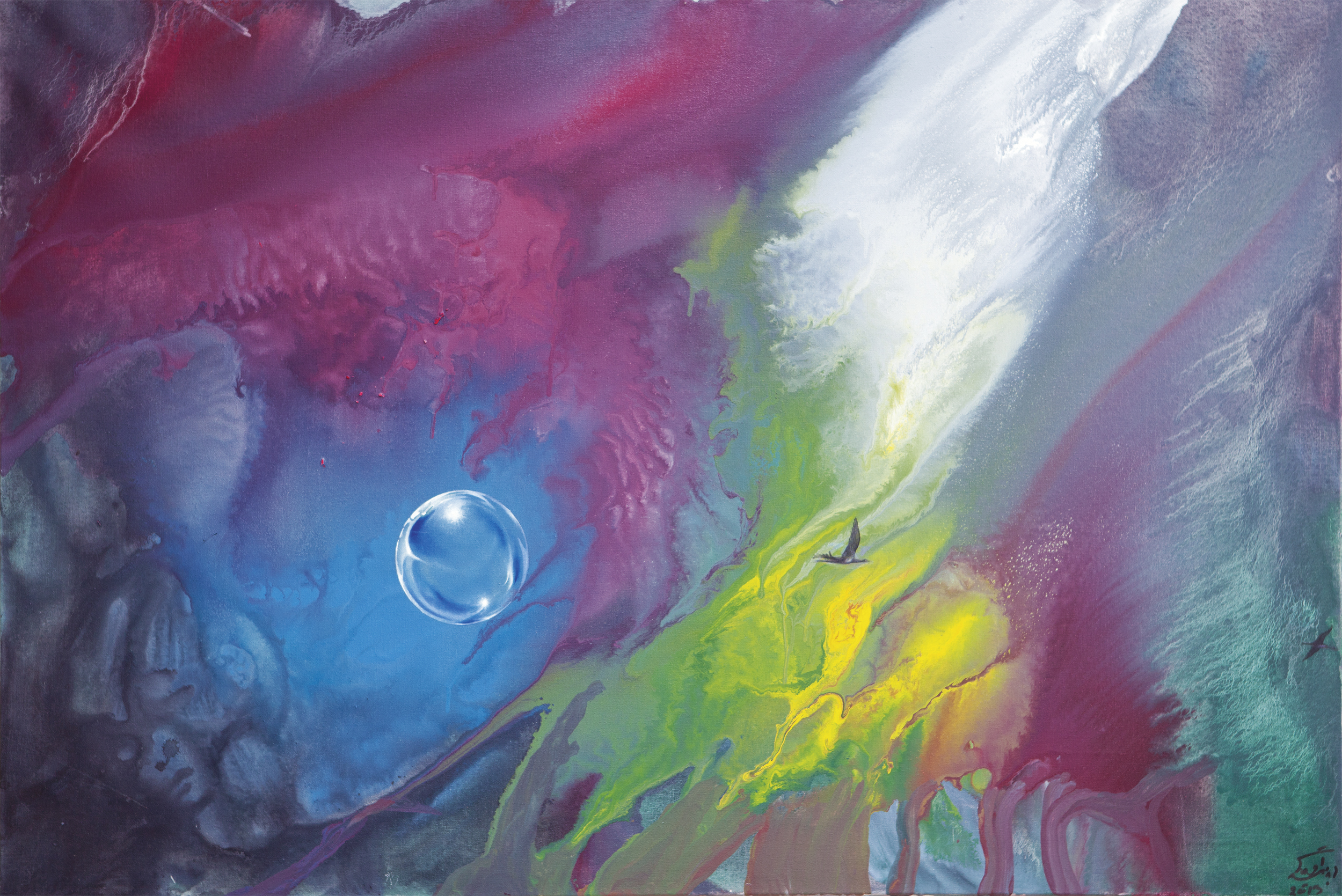 Ebrahim Ehrari, Eine Luftblase, 2013, Öl und Acryl auf Leinwand, 150x100cm